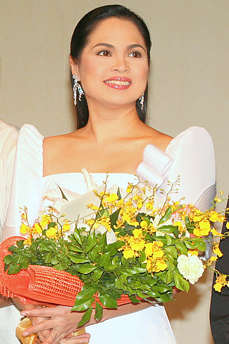 Filipino actress Judy Ann Santos